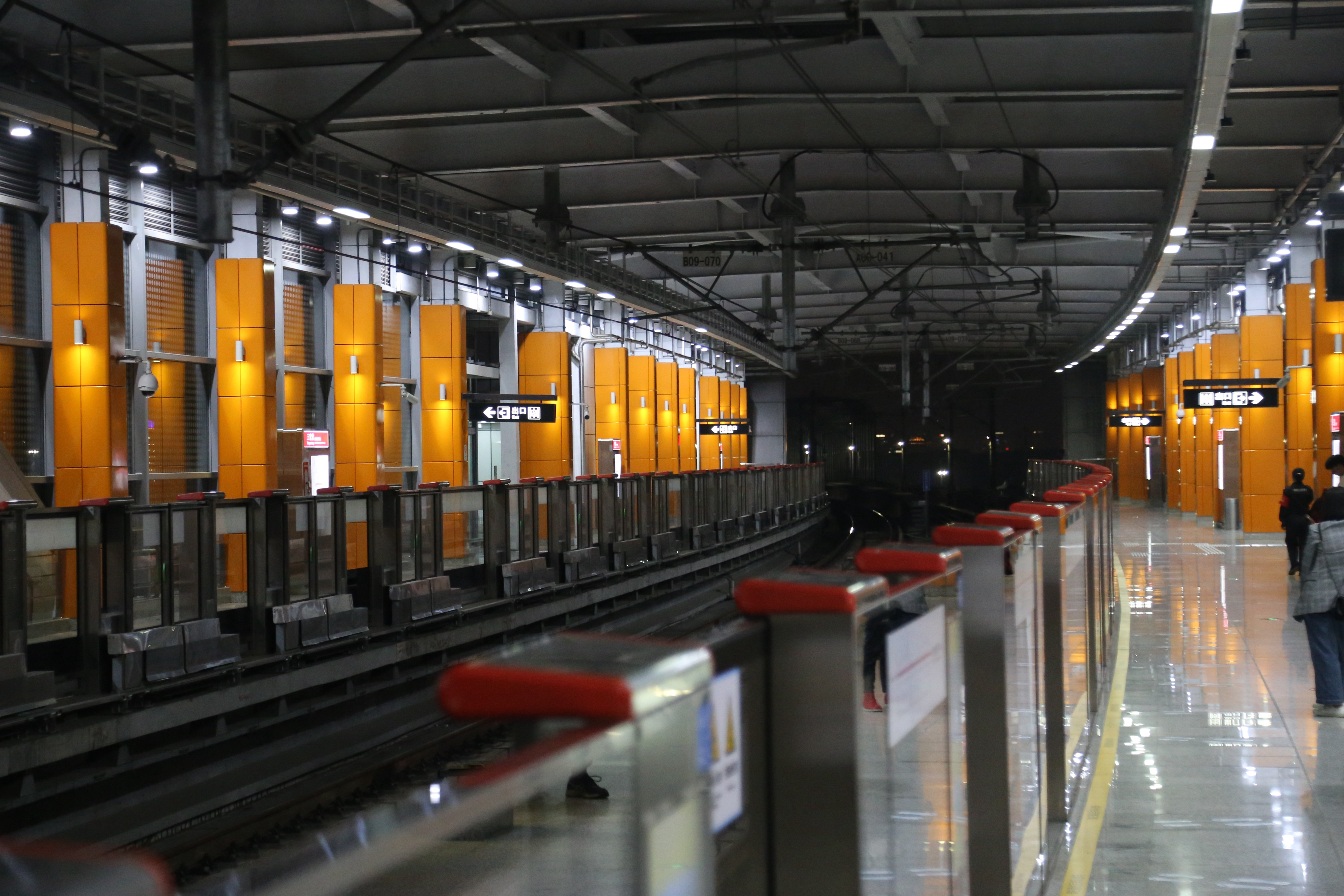 三官堂站站台